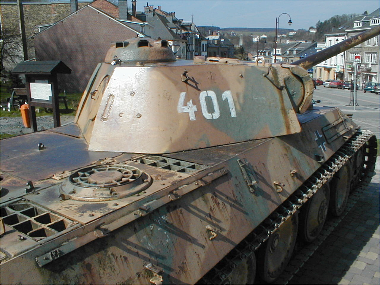 Char Panther V se trouvant à Houffalize